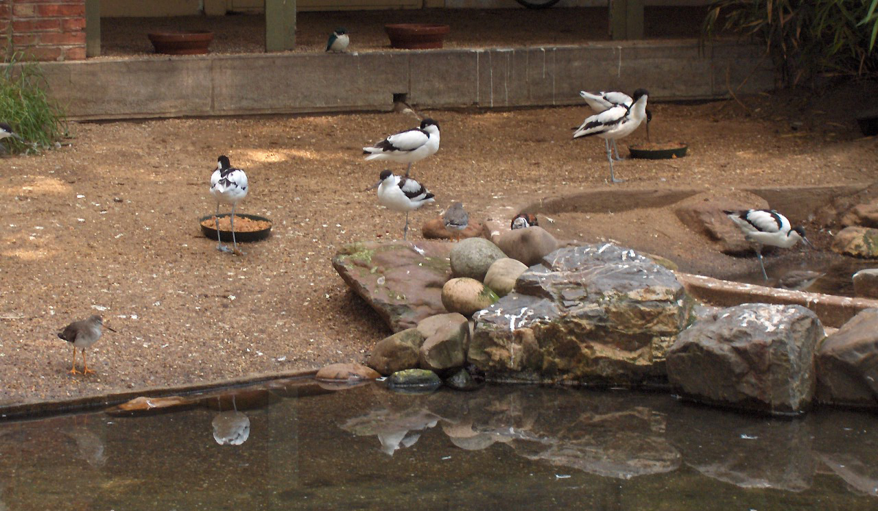 Species Recurvirostra avocetta Family Recurvirostridae